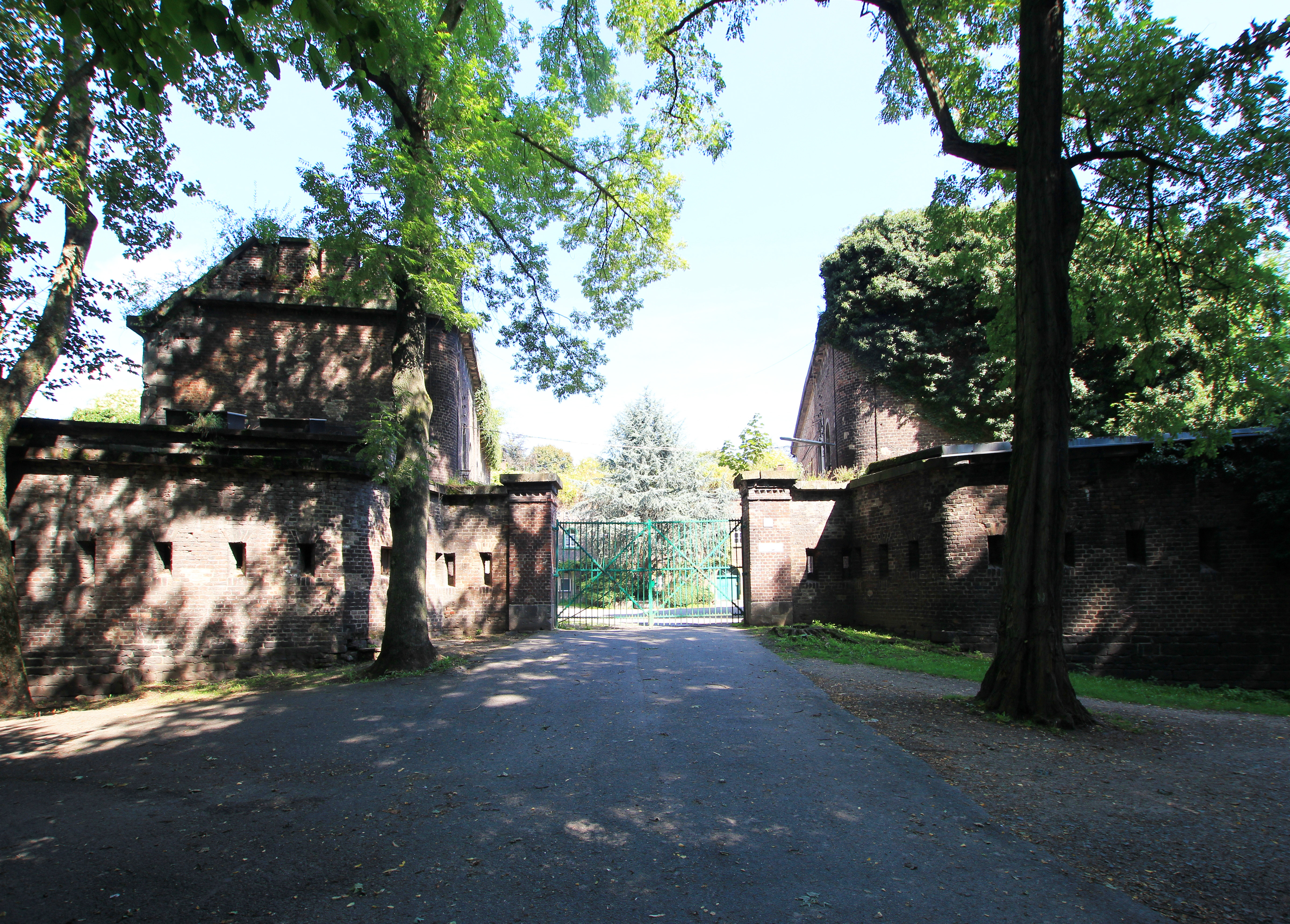 Köln-Neustadt-Nord, Neusser Wall 33 Fort X